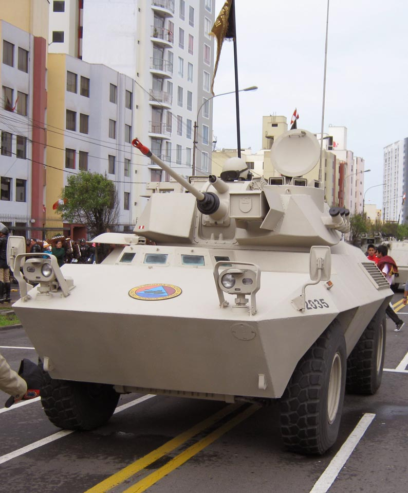 Blindado FIAT-6616 en la Parada Militar 2011